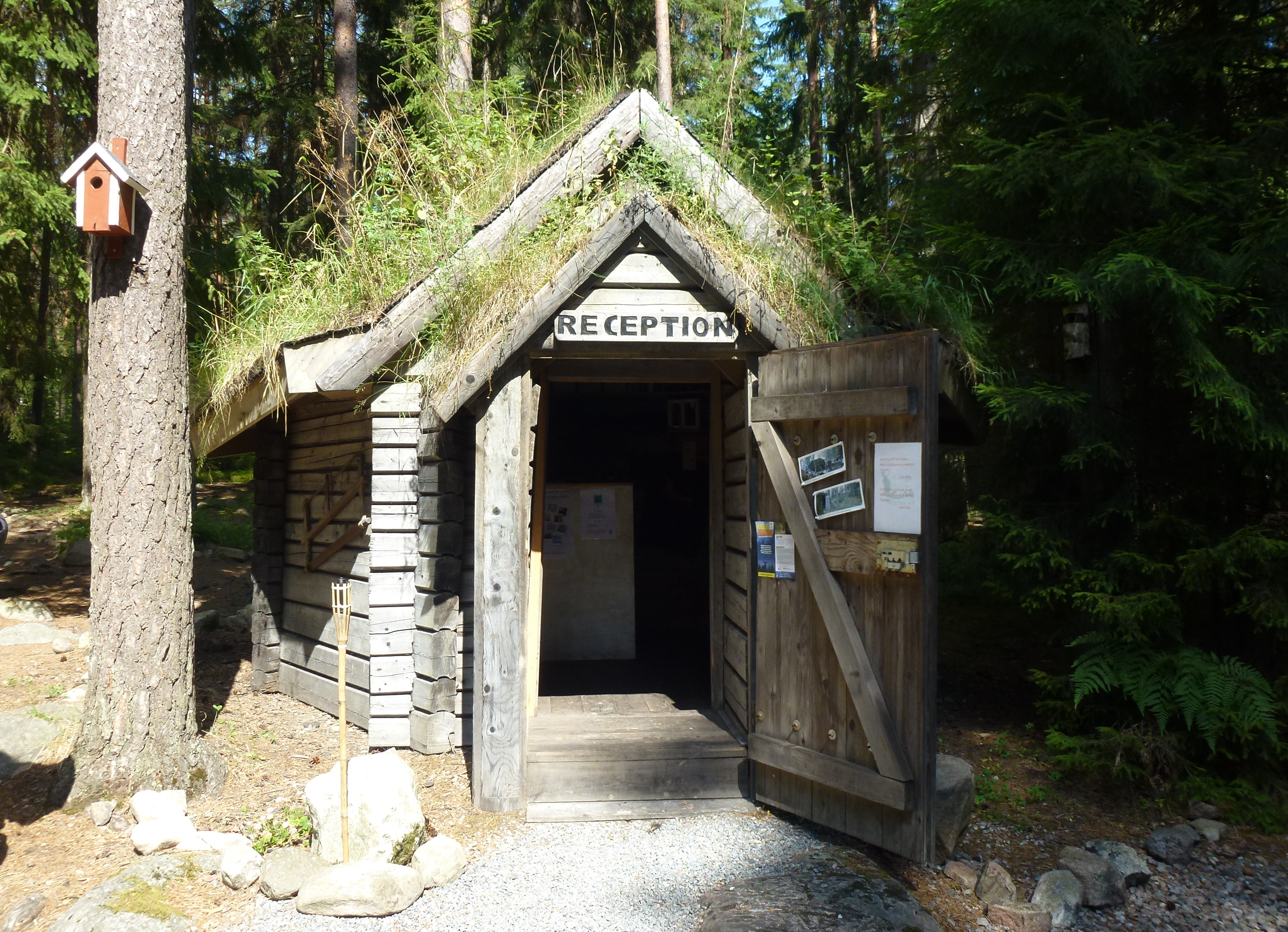 Kolarbyn, vandrarhem i Skinnskattebergs kommun, Ekomuseum Bergslagen